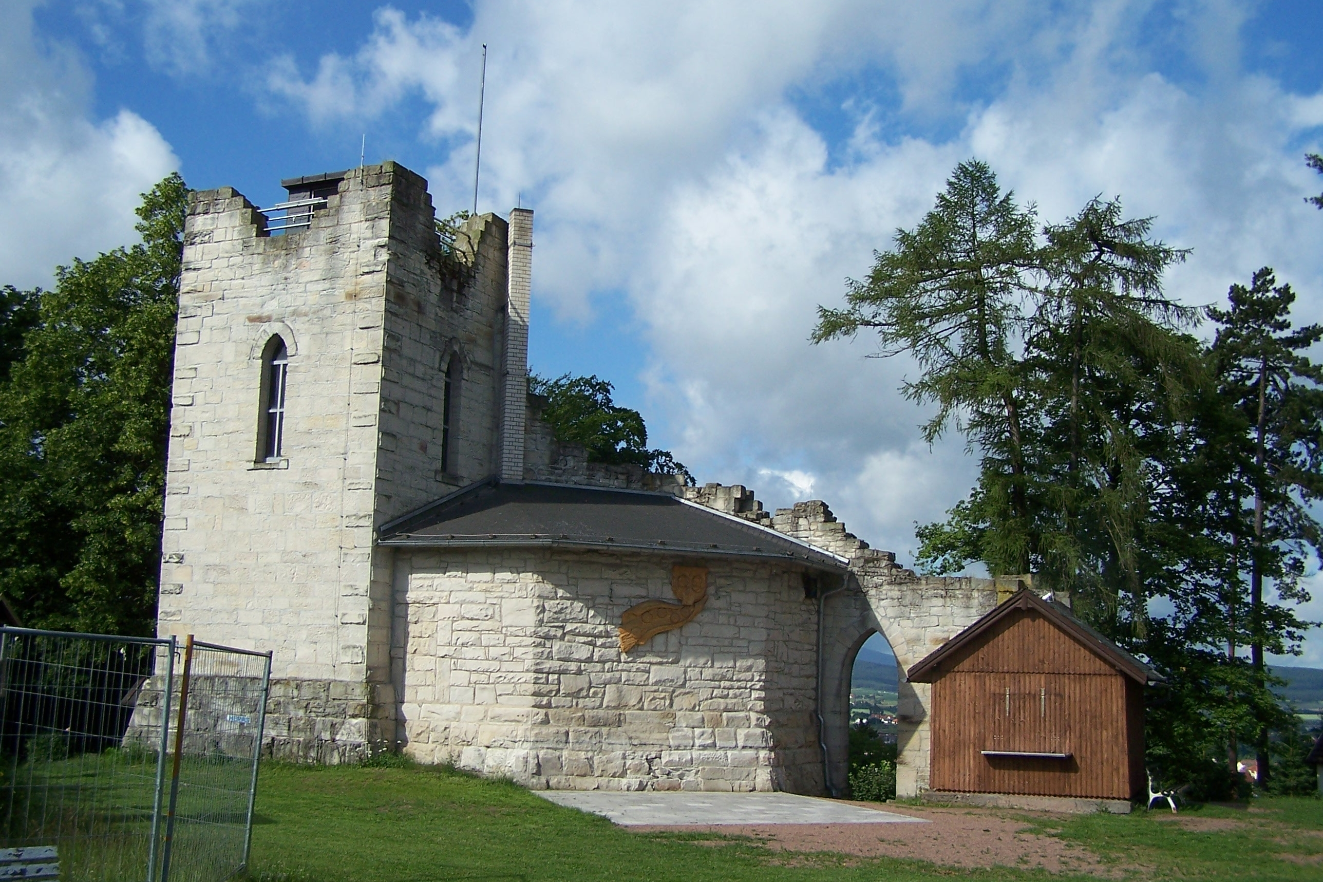 Die auf dem Gipfel des Frankensteins errichtete Kunstruine mit Aussichtsturm.